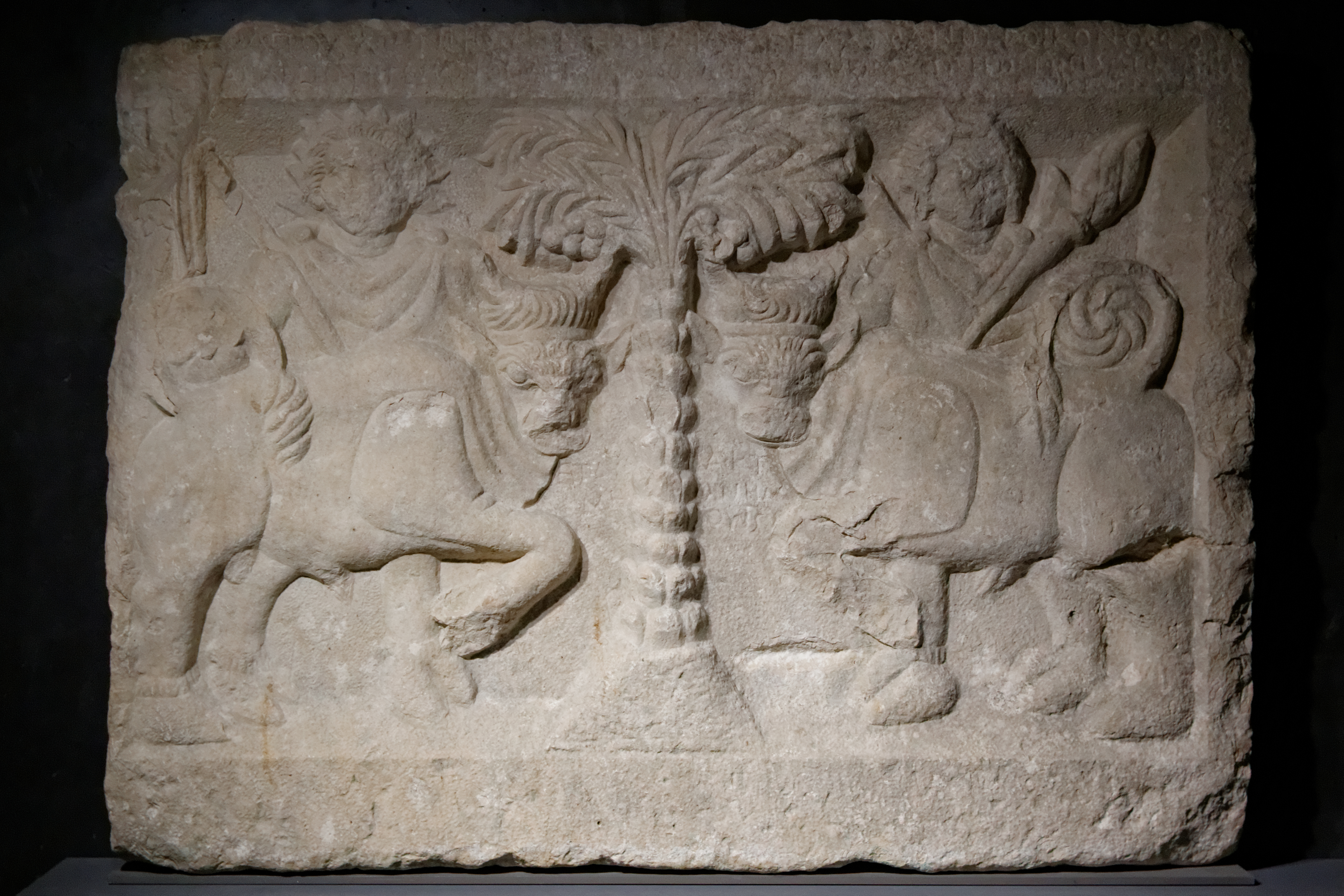 Selon l'inscription, ce relief d'époque romaine représente le dieu Apollon accompagné de sa sœur Artémis. Les différents attributs astraux : le croissant, la torche, le fouet et le taureau à tête radiée les rapprochent de la figuration d'Hélios et Séléné. Le palmier, arbre de vie, a une forte signification symbolique : celle de la grande déesse primitive, dont la représentation entre deux animaux affrontés a souvent été déclinée dans la glyptique, les ivoires et la sculpture.